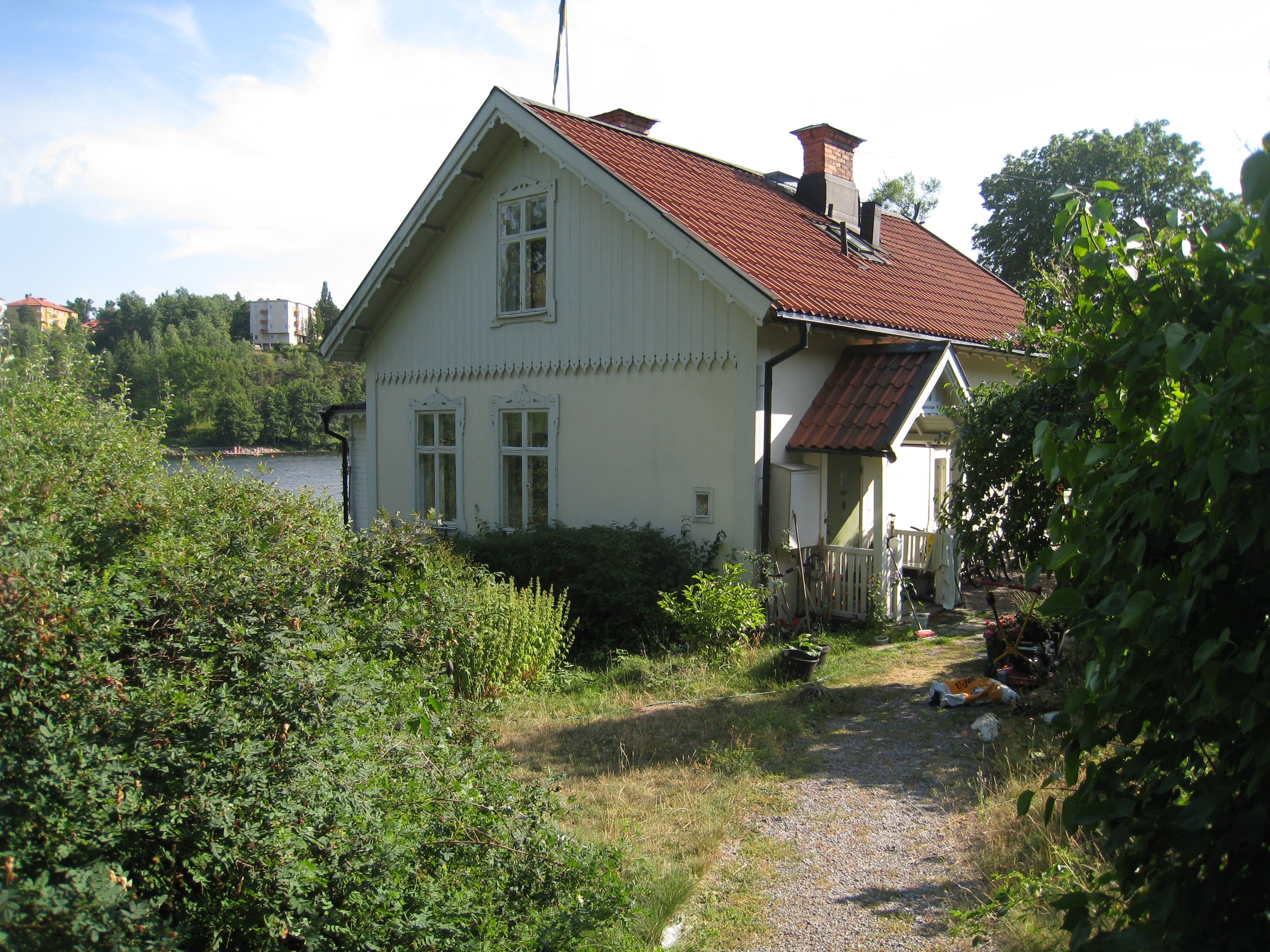 Lilla sjövillan i Äppelviken i Bromma tillhör "Mälarstrandens sommarbebyggelse".